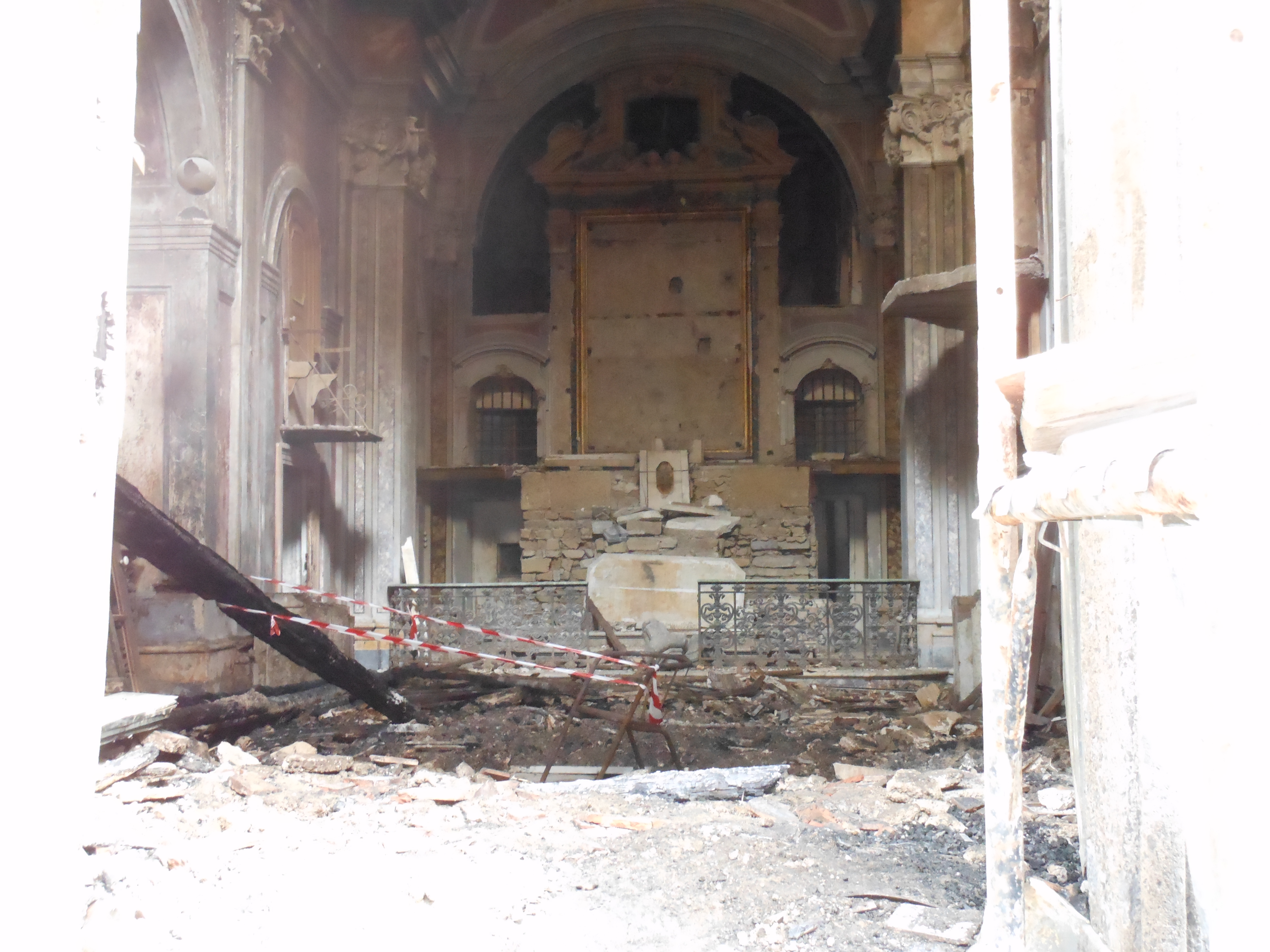 Interno del Sacro tempio della Scorziata a Napoli dopo l'incendio del 17 gennaio